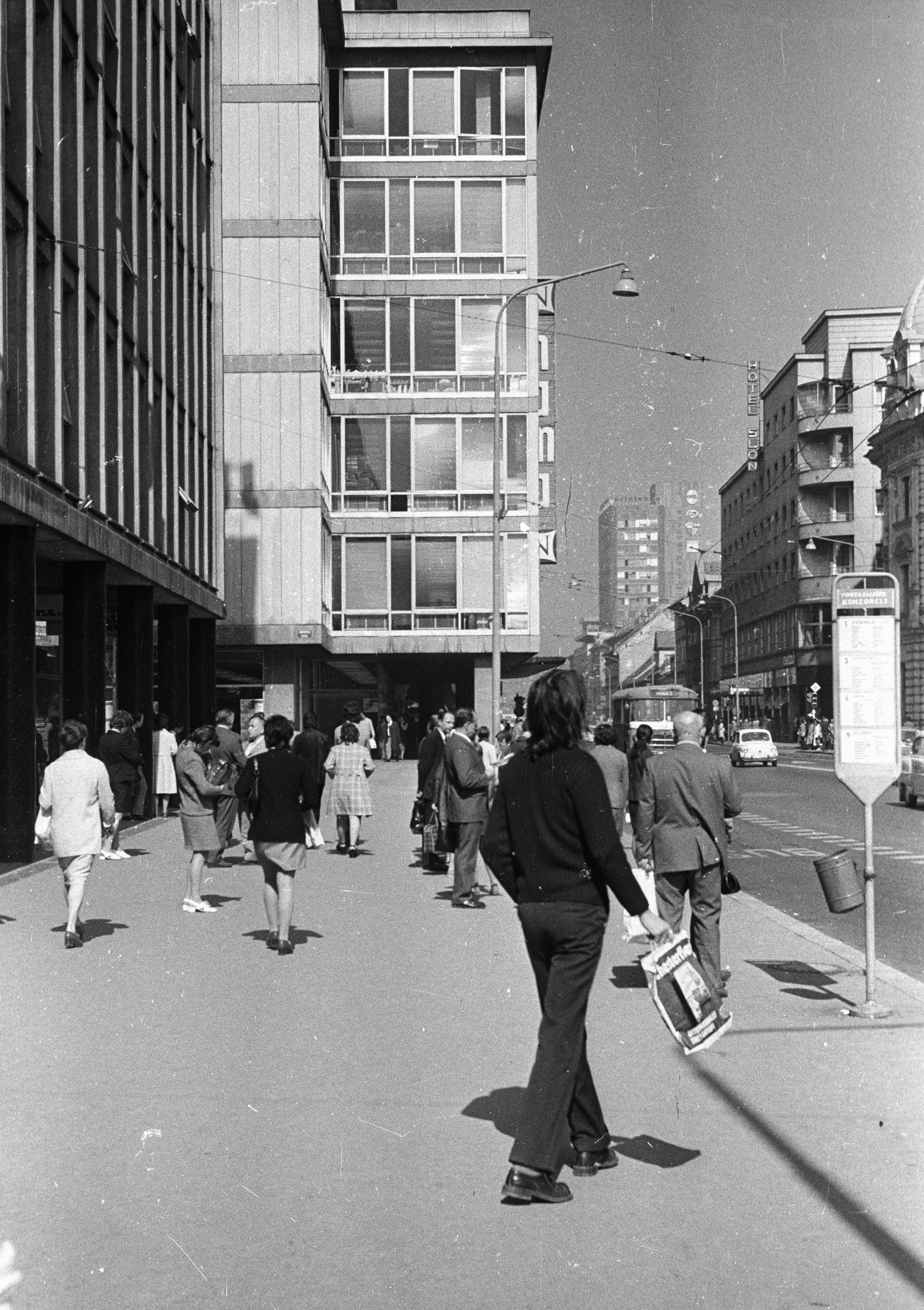 a Konzorcij buszmegálló a Slovenska cestán. Szlovénia (ekkor Jugoszlávia, Szlovénia Szocialista Népköztársaság), Ljubljana. Location: Slovenia, Ljubljana Tags: street view, Yugoslavia Title: a Konzorcij buszmegálló a Slovenska cestán.